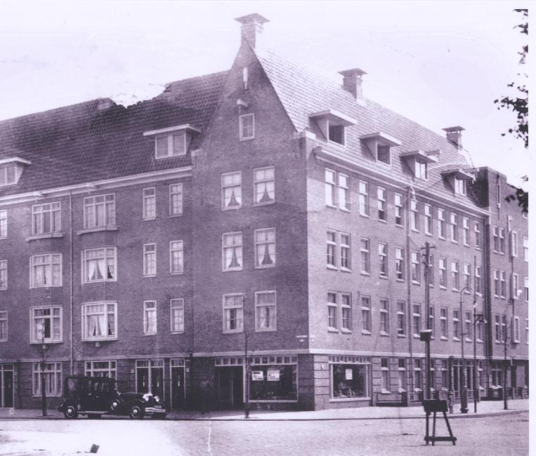 Arbeiderswoningen in de Stadionbuurt Amsterdam, verhuurd door woningbouwvereniging Zomers Buiten